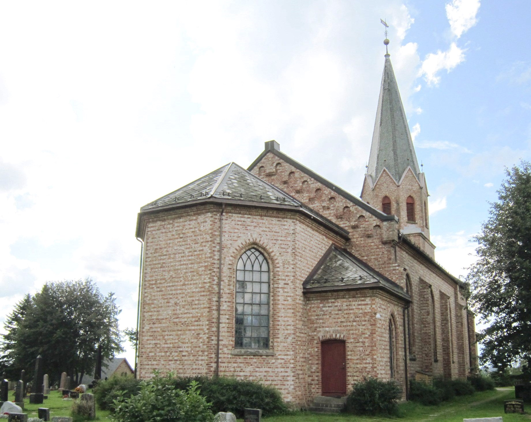 Årnes kirke